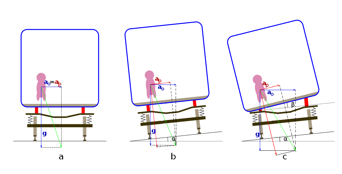 Průjezd obloukem nepřevýšeným, převýšeným a s naklápěcí skříní, ap=konst.